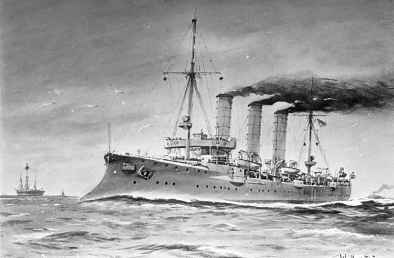 Kleiner Kreuzer "SMS Berlin" Kleiner Kreuzer "S.M.S. Berlin" der Bremen-Klasse.- Gemälde von Willy Stöwer (1864-1931)